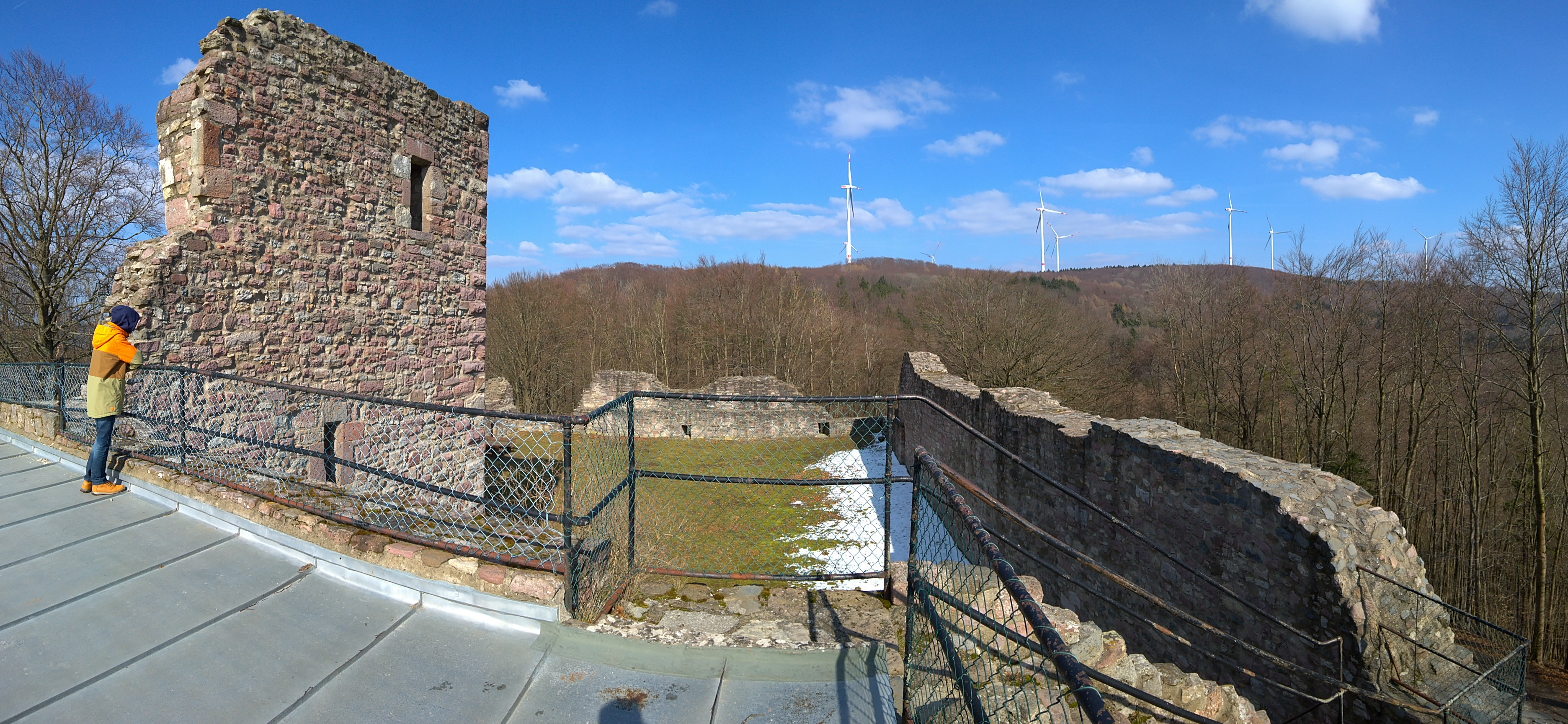 Burgruine Steckelberg bei Ramholz, Blick vom Dach des Rundturms über die Burgruine